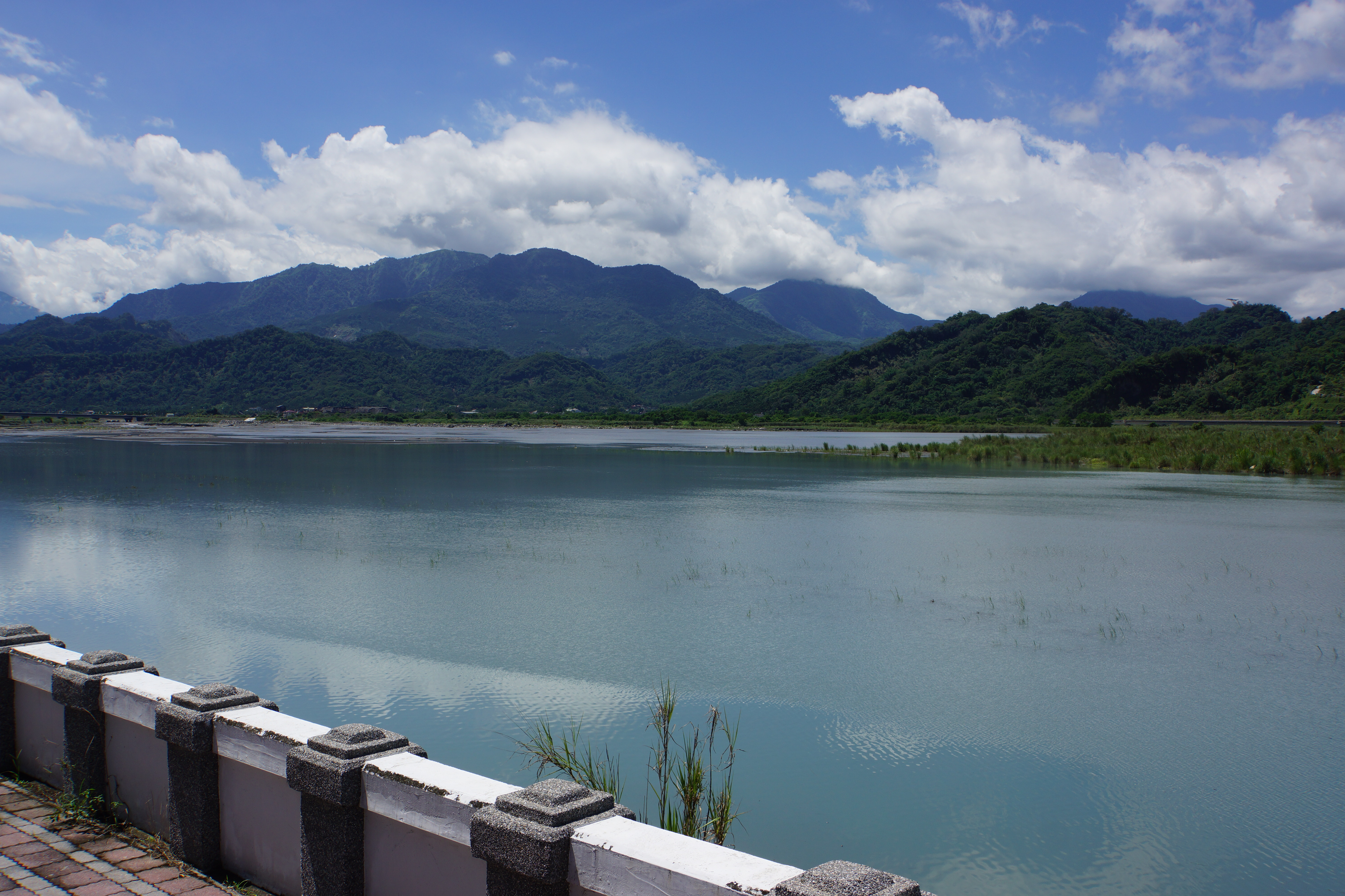 濁水溪 Zhuoshui River